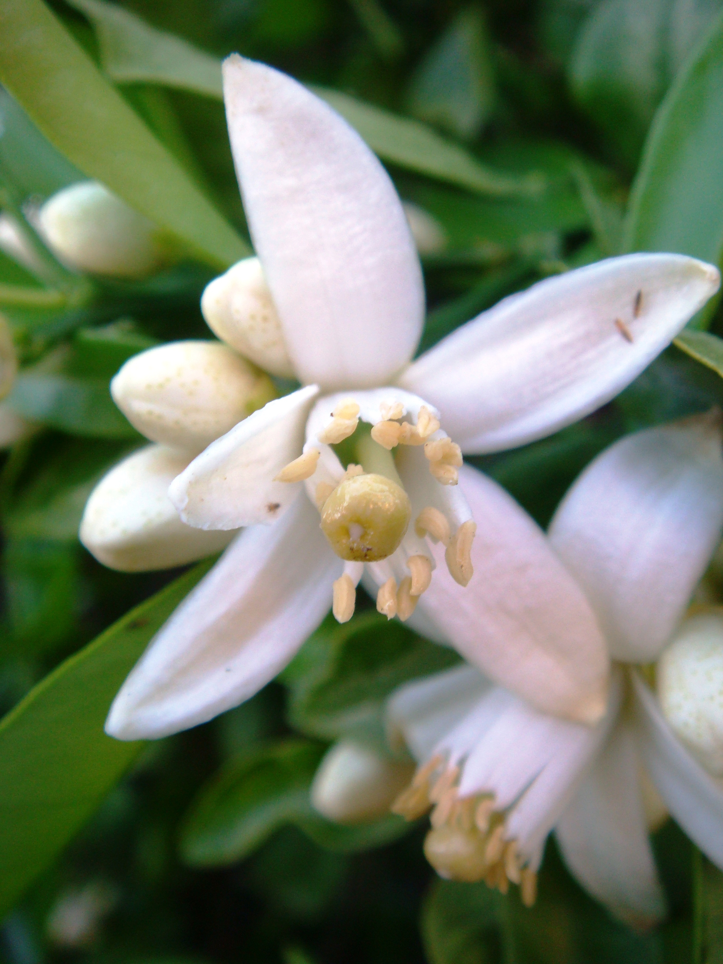 Citrus x paradisi, cultivated, private residence, Phoenix, Arizona